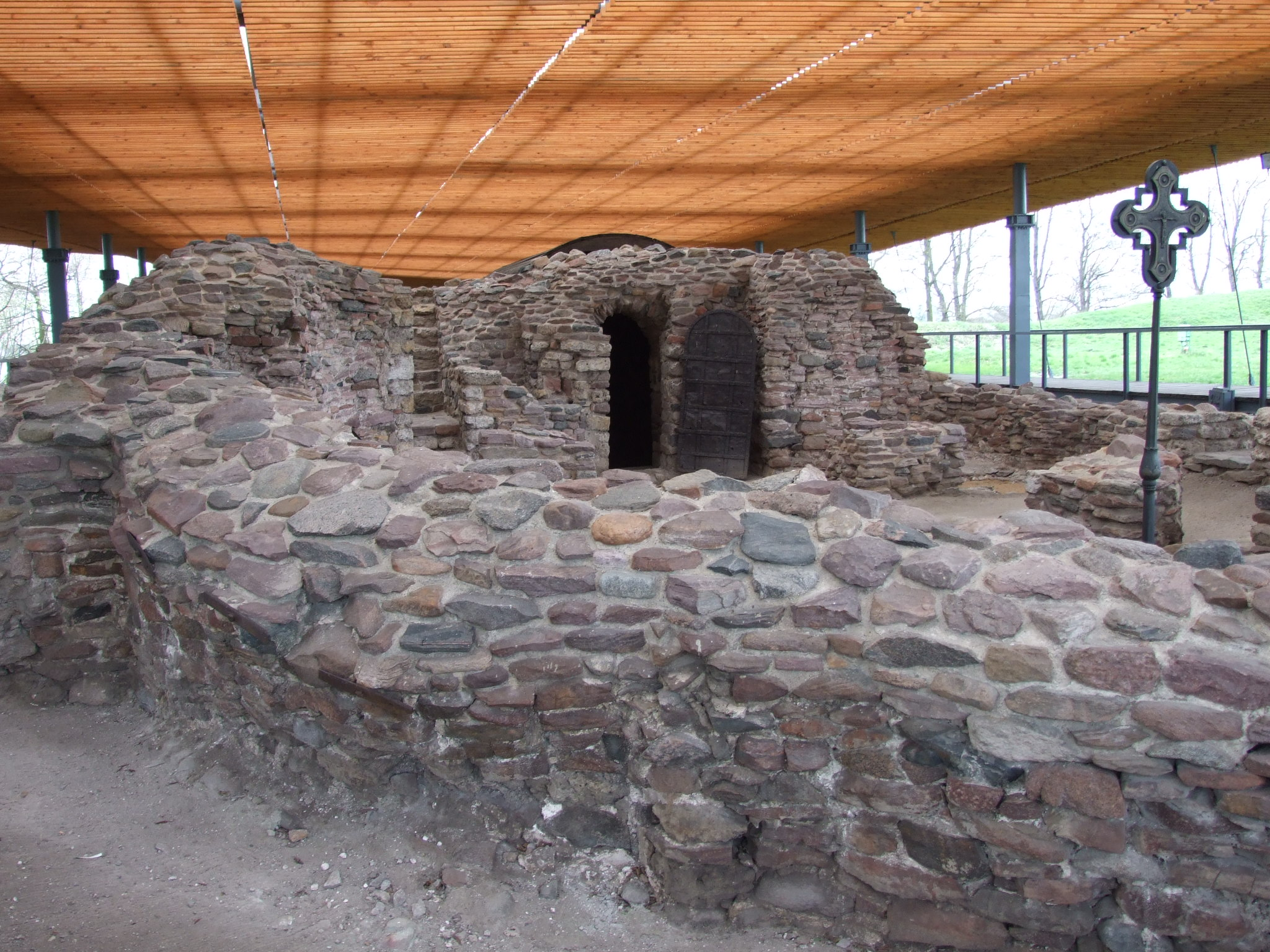 Ostrów Lednicki - ruiny palatium i kaplicy